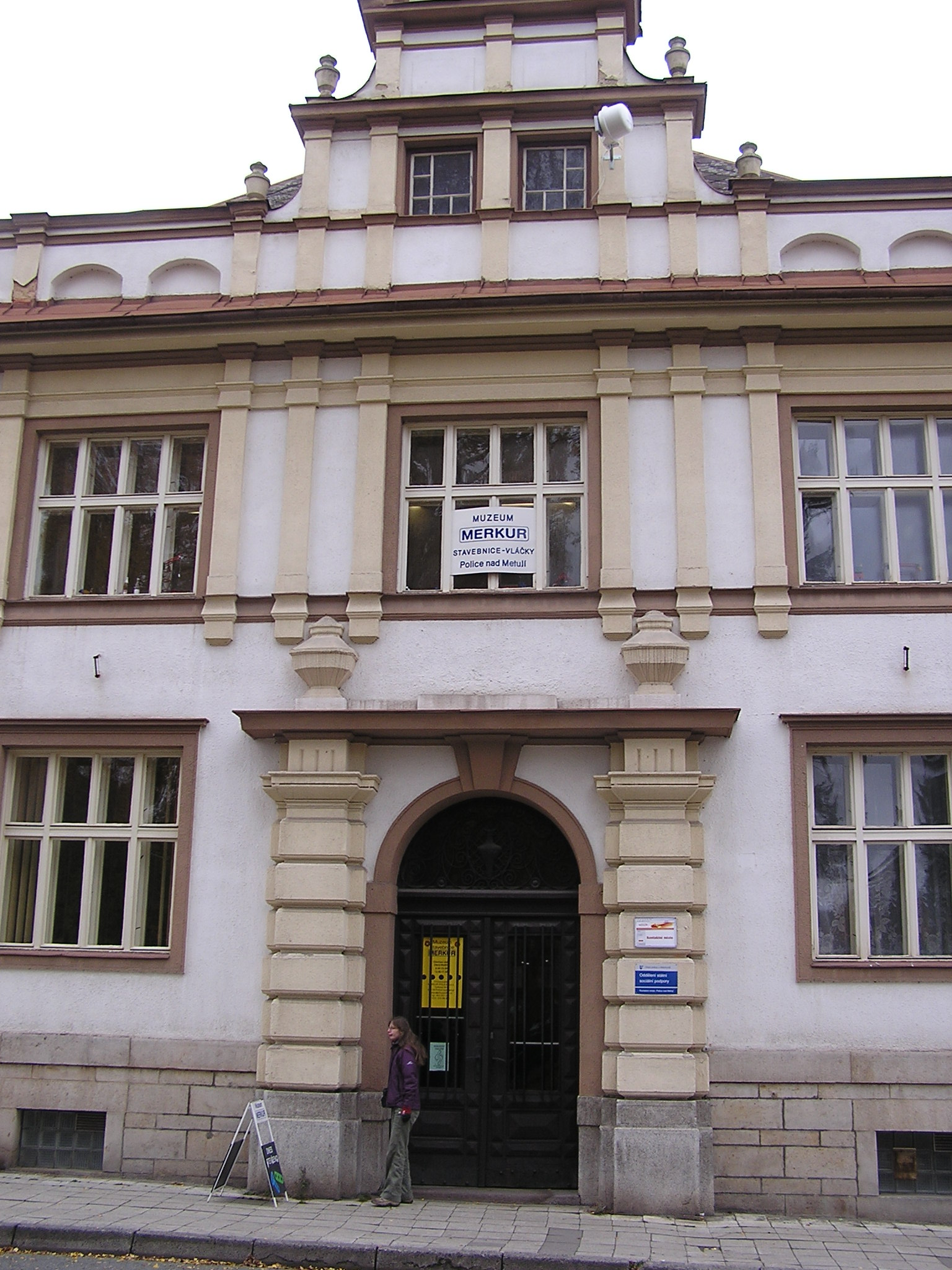 Muzeum Merkuru, Police nad Metují